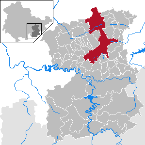 Neustadt an der Orla in Thuringia - Saale-Orla-Kreis